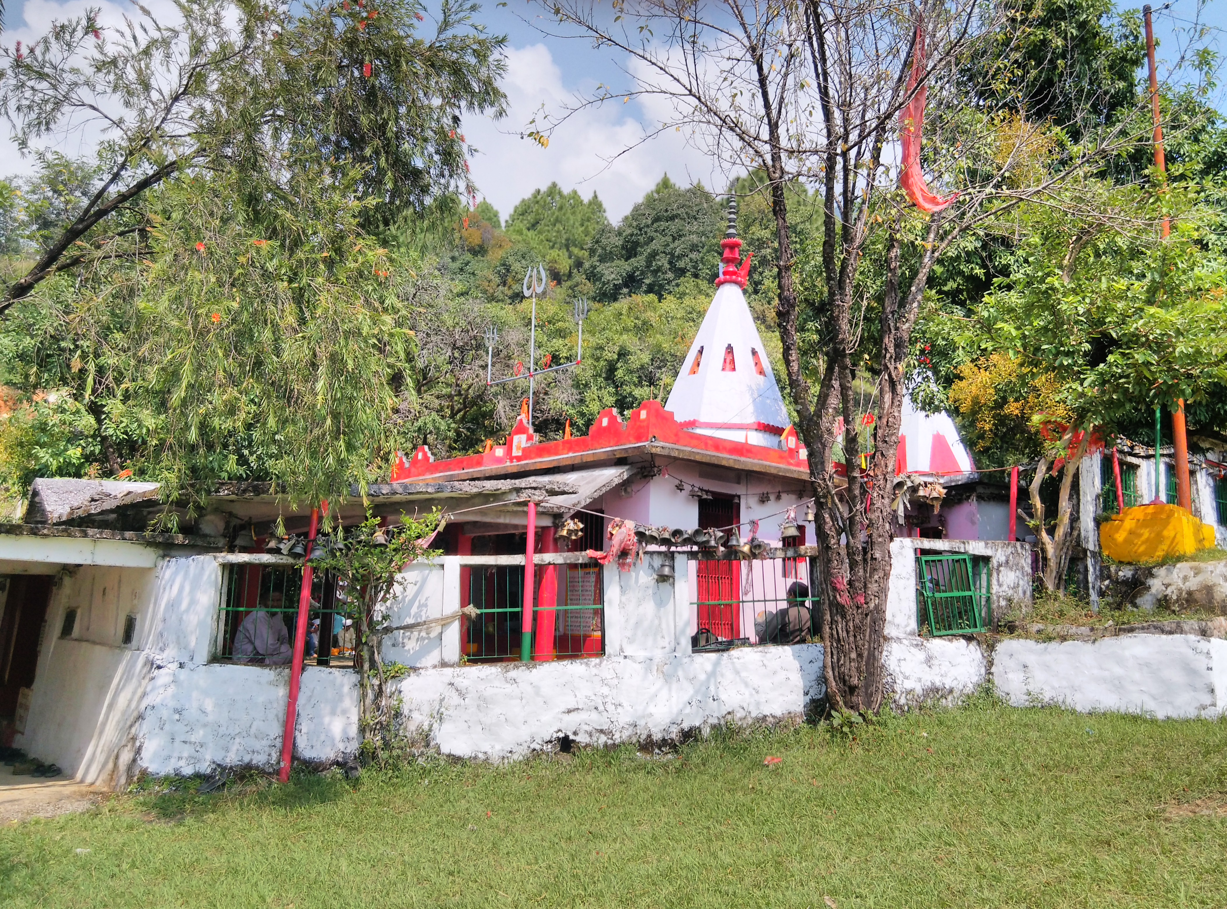 Bhagwati Mandir at Pothing Village.